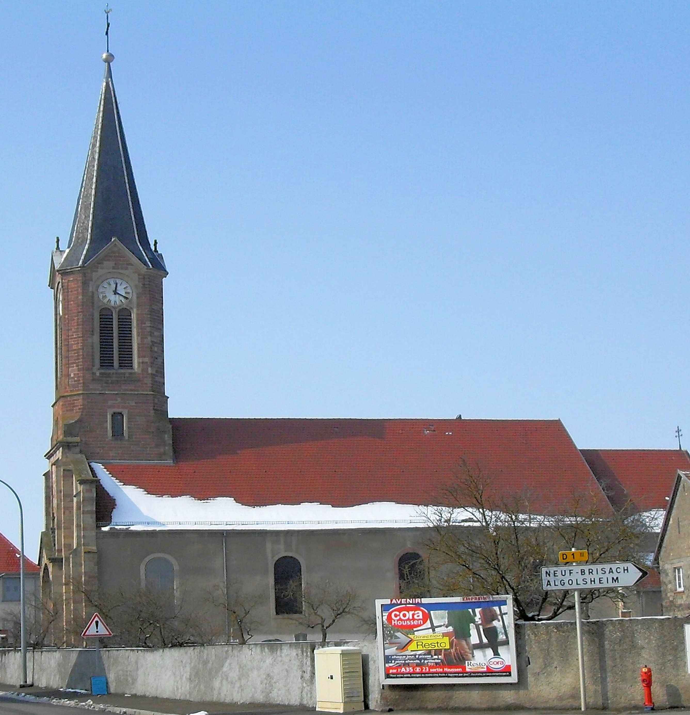 L'église Saint-Gall d'Obersaasheim